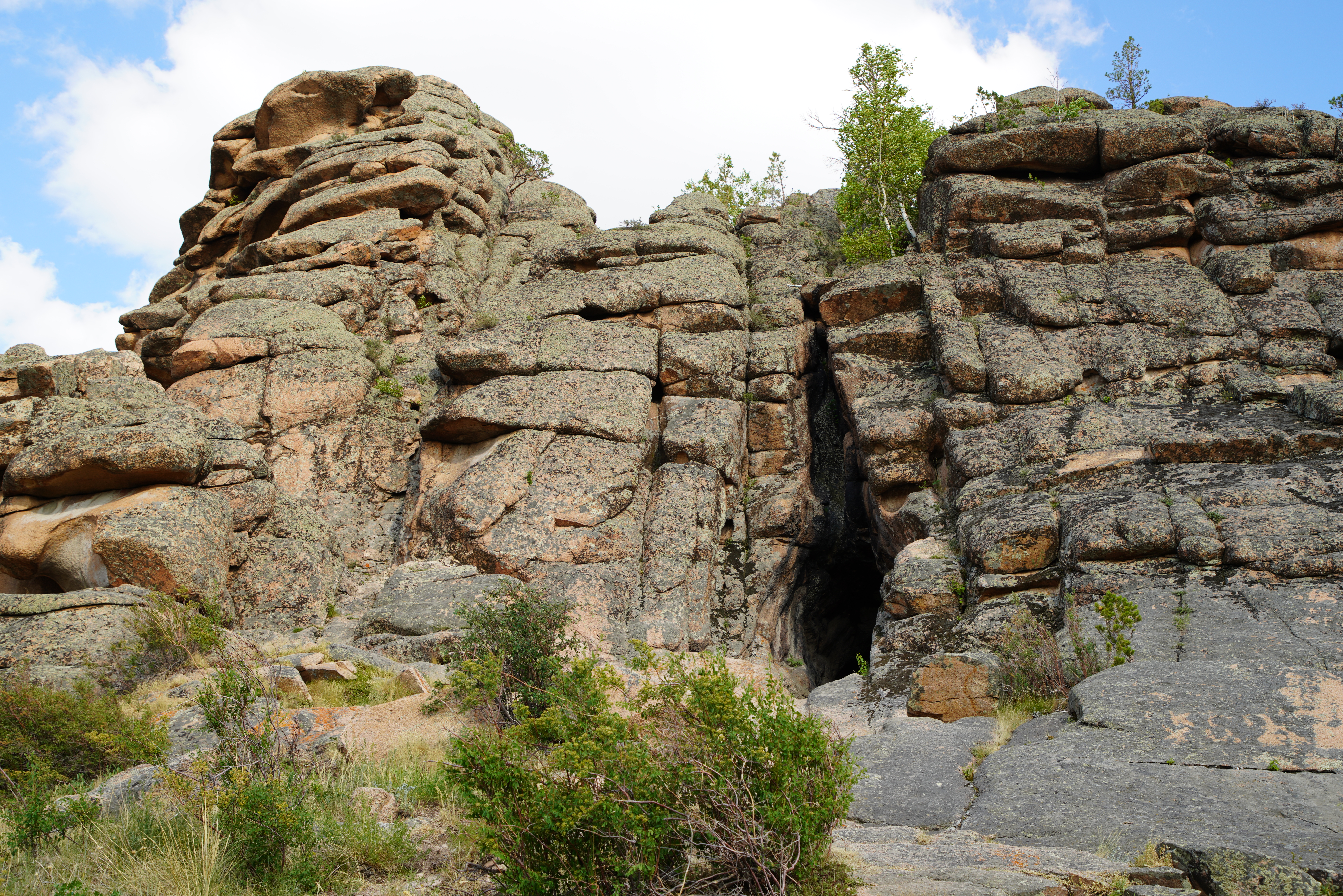 Пещера Коныр-Аулие, Баянаульский национальный парк